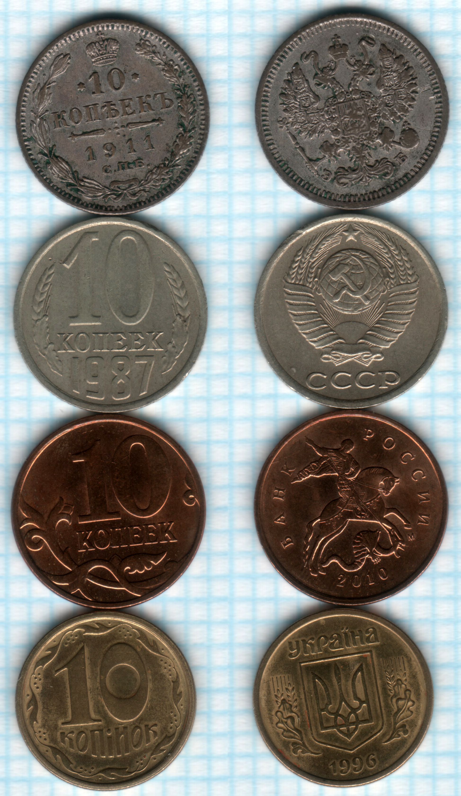 10 kopeks del Imperio ruso, Unión Soviética, Rusia, Ucrania. Fondo: papel milimetrado (2 mm).